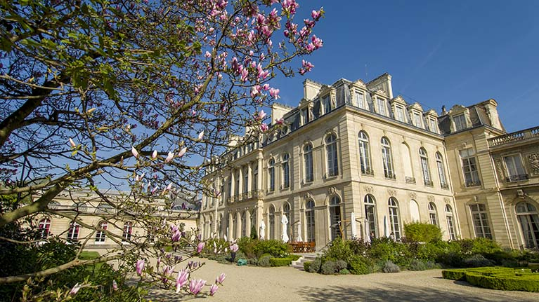 Le palais de l'Élysée est un ancien hôtel particulier parisien, situé au no 55, rue du Faubourg-Saint-Honoré à Paris, dans le 8e arrondissement. Il est le siège de la présidence de la République française et la résidence officielle du président de la République depuis la IIe République.